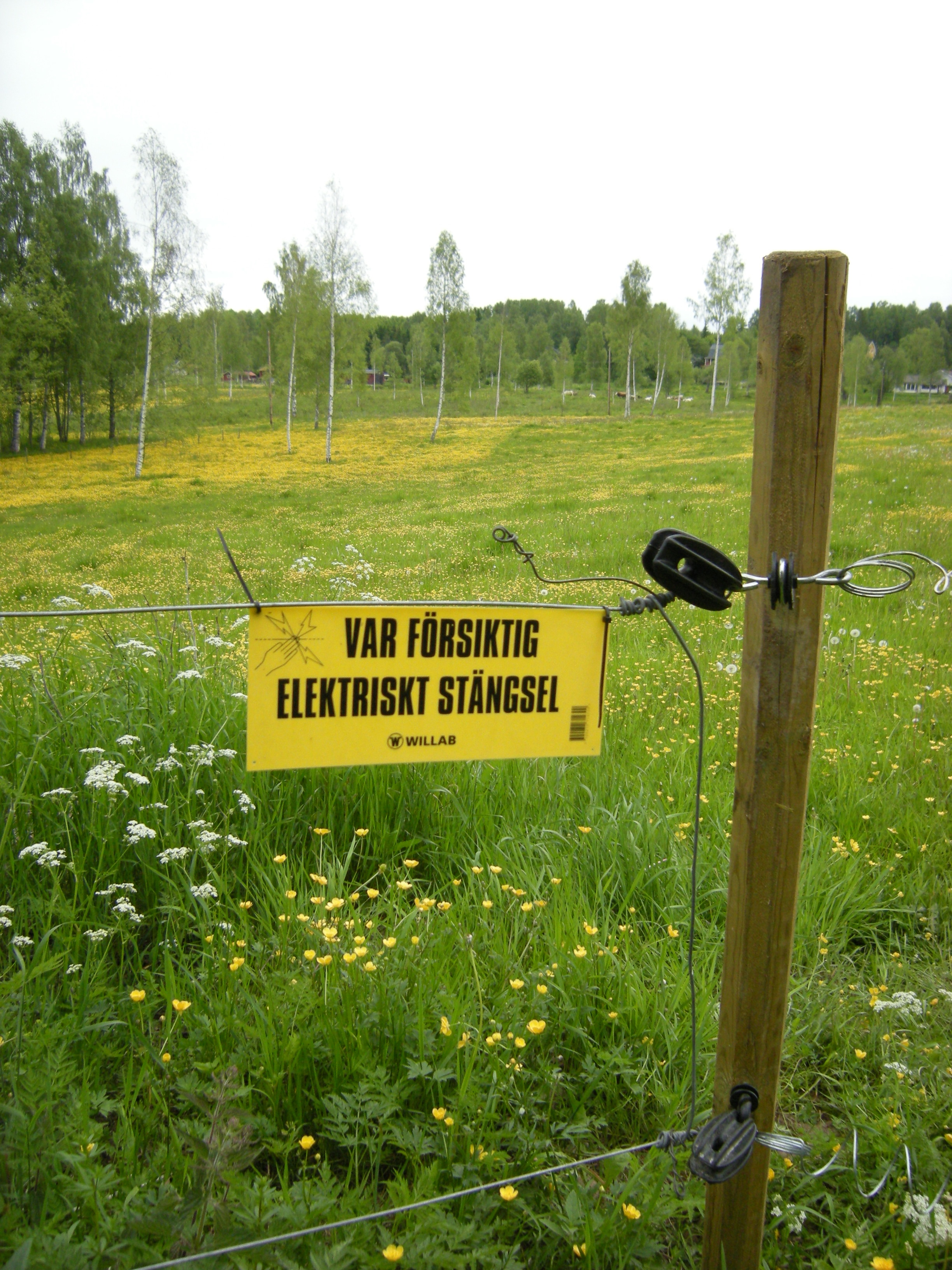 Elstängsel med varningsskylt.